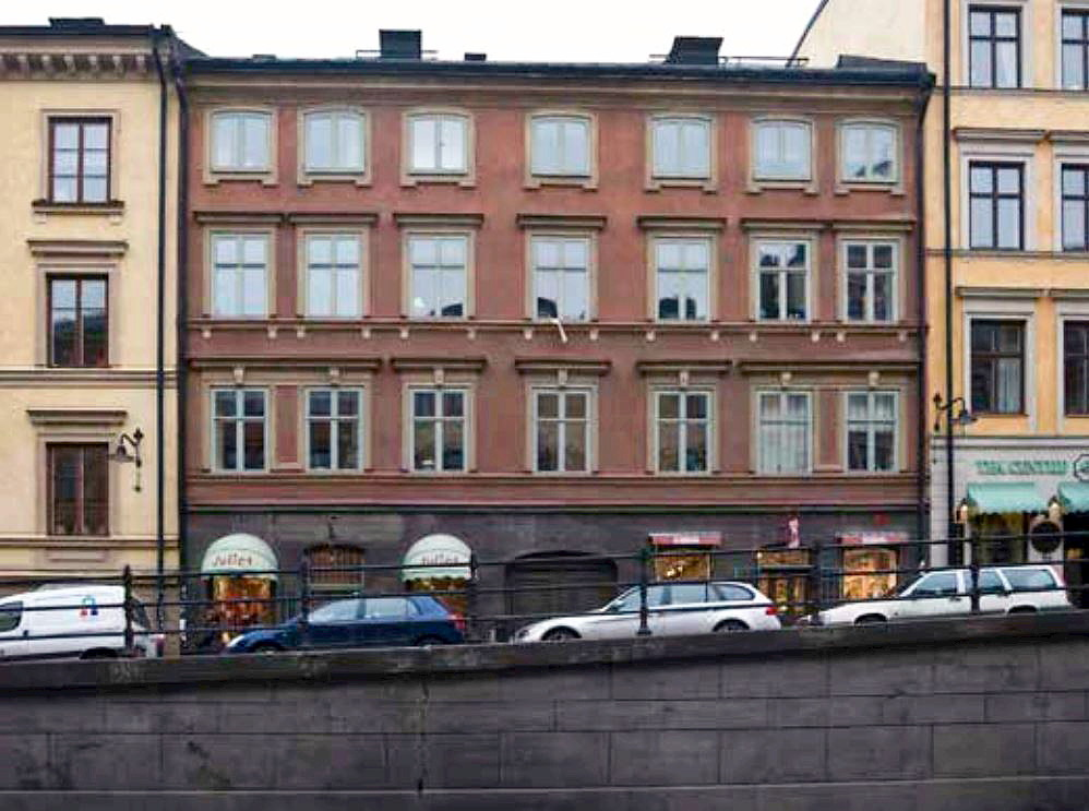 Hornsgatan 48, kvarteret Ormen mindre 13